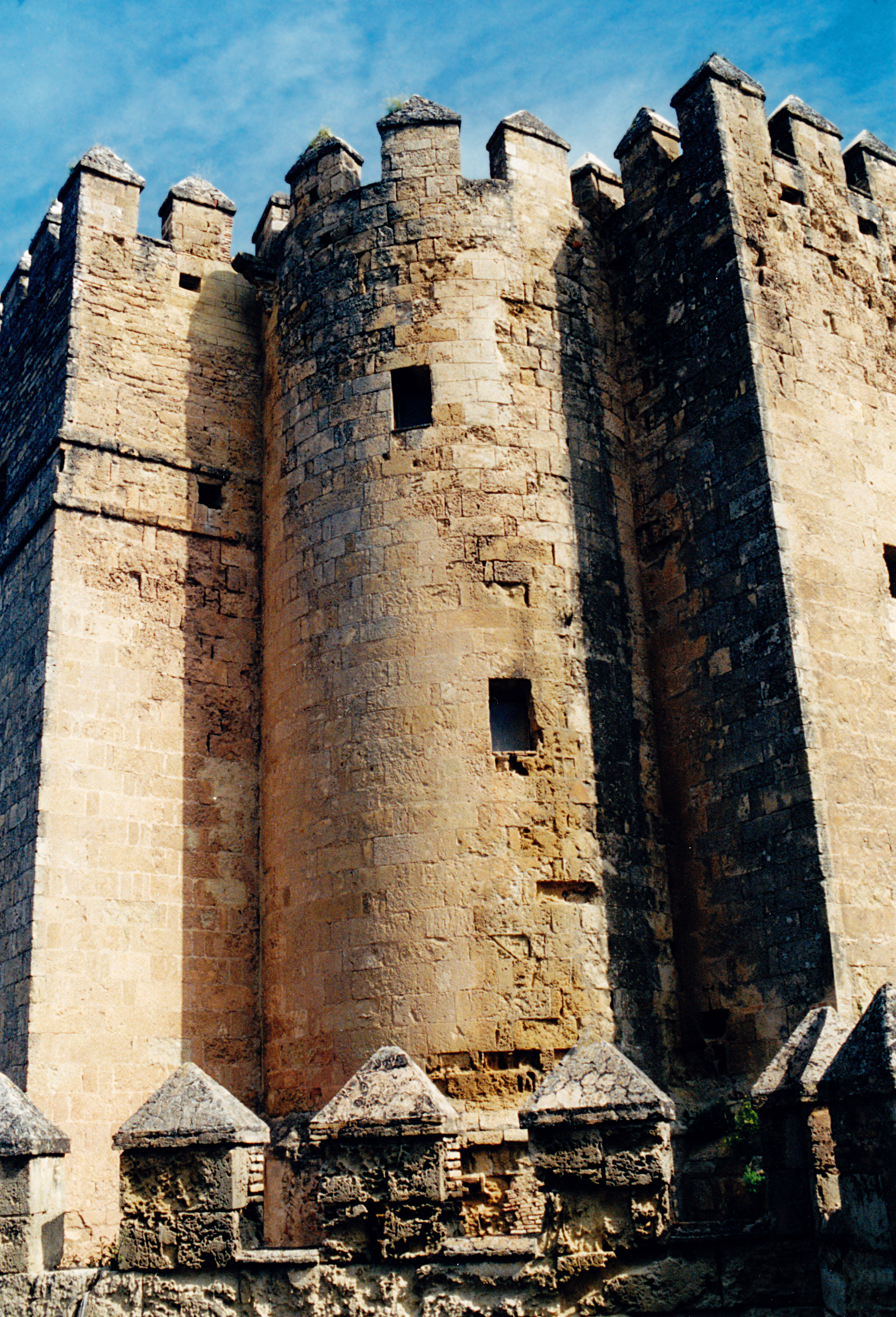 Cordoue - Tour de la Calahorra (almohade)